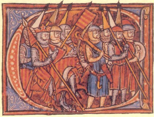 Caplletra del Vidal Mayor, primera recopilació dels Furs d'Aragó en temps de Jaume I d'Aragó i feta pel bisbe Vidal Canyelles